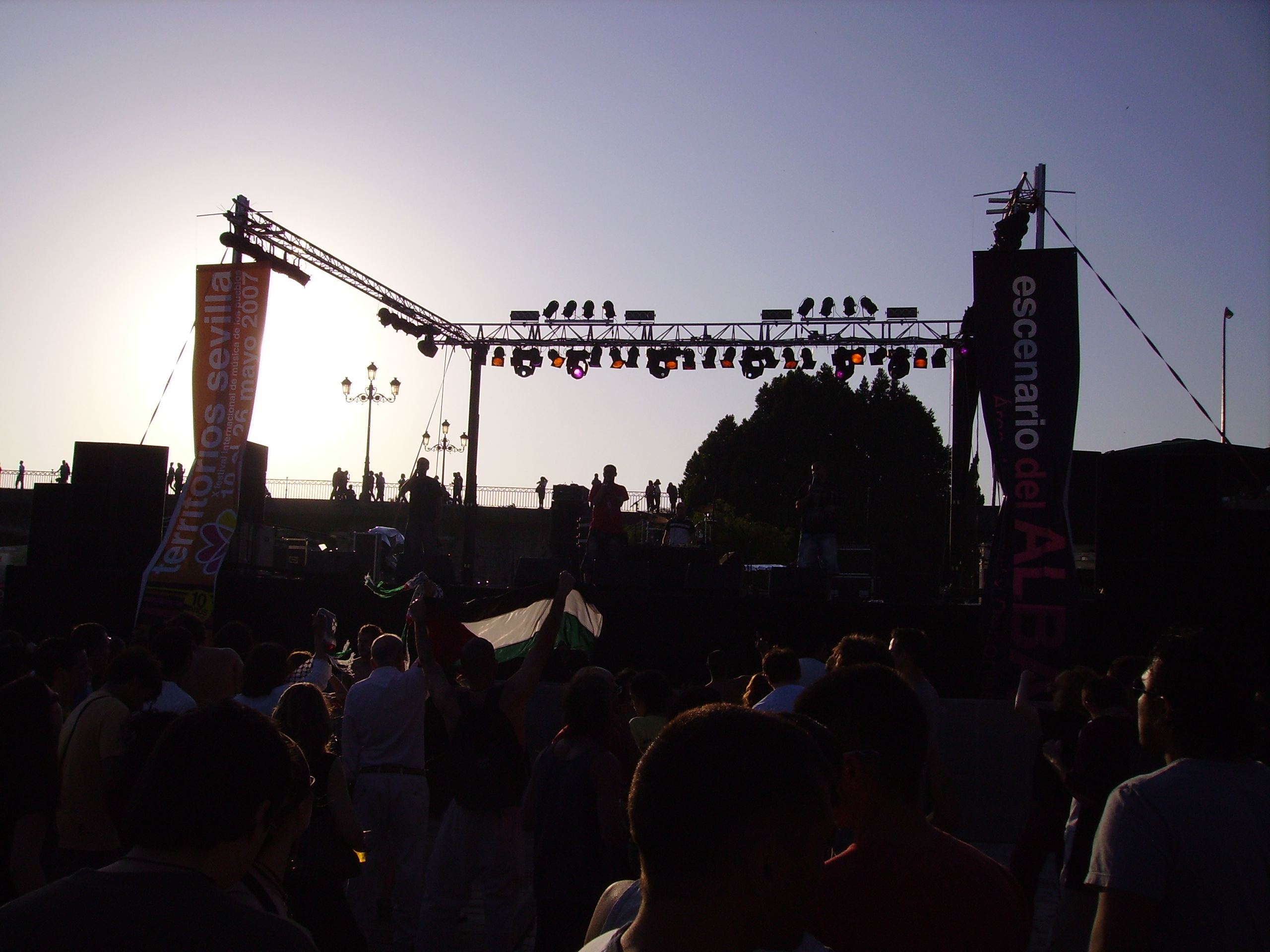 Dam en un concierto en Sevilla.